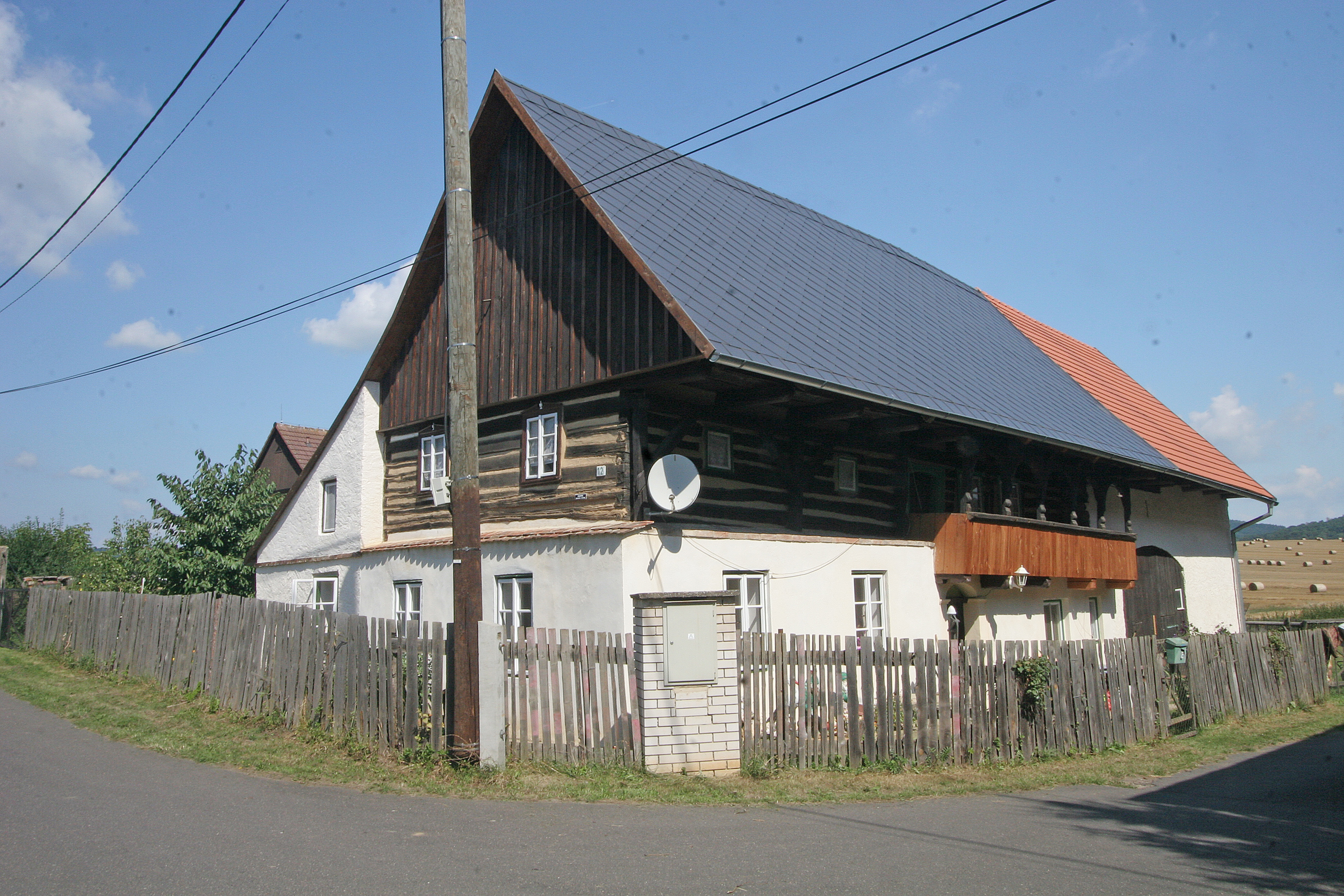 Venkovská usedlost se stodolou (Ličenice), Ličenice 12